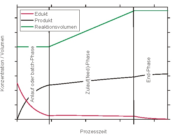 Beispiel für einen fed-batch-Prozess